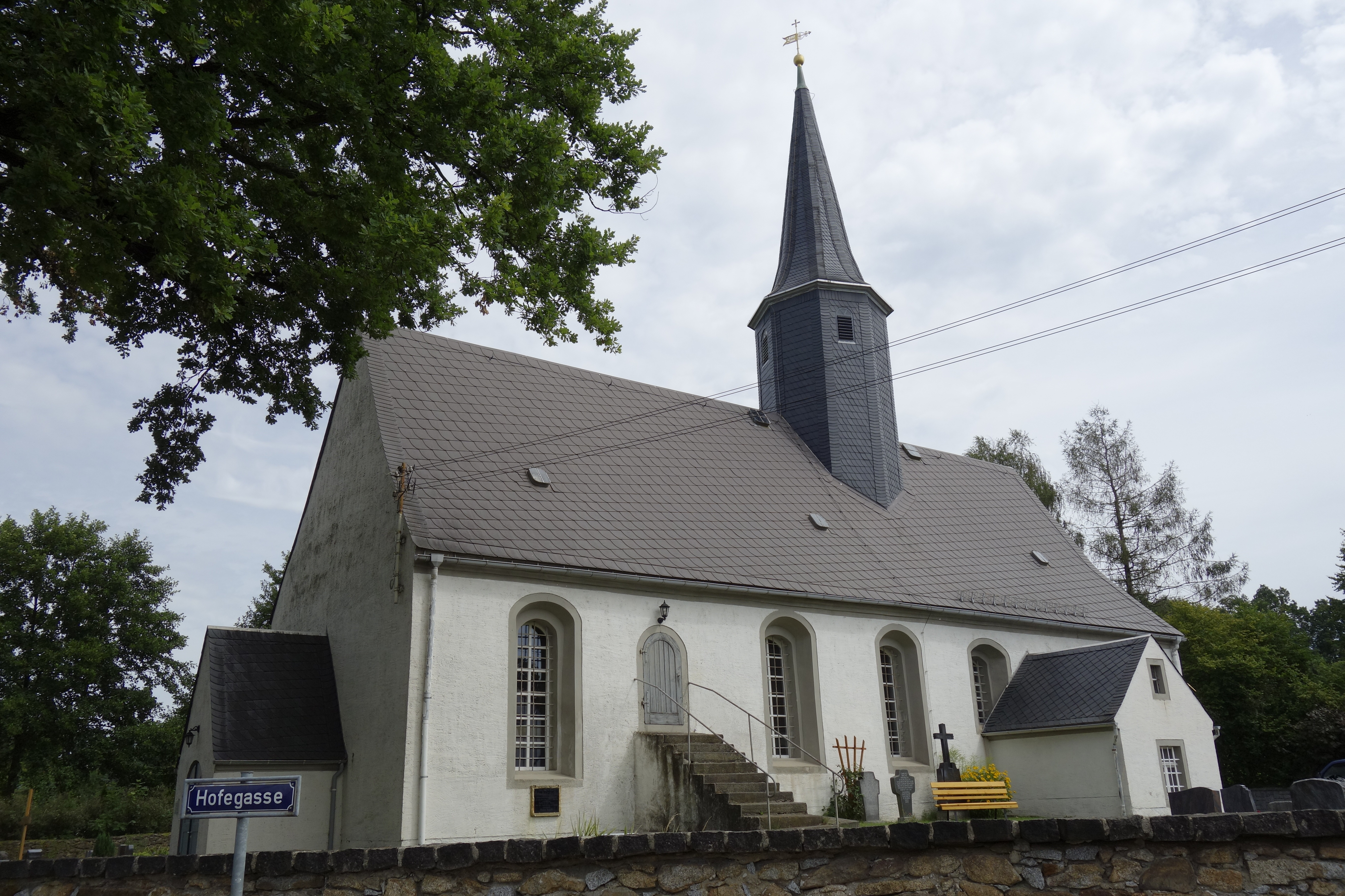 Kirche Höckendorf Juli 2017 (1)